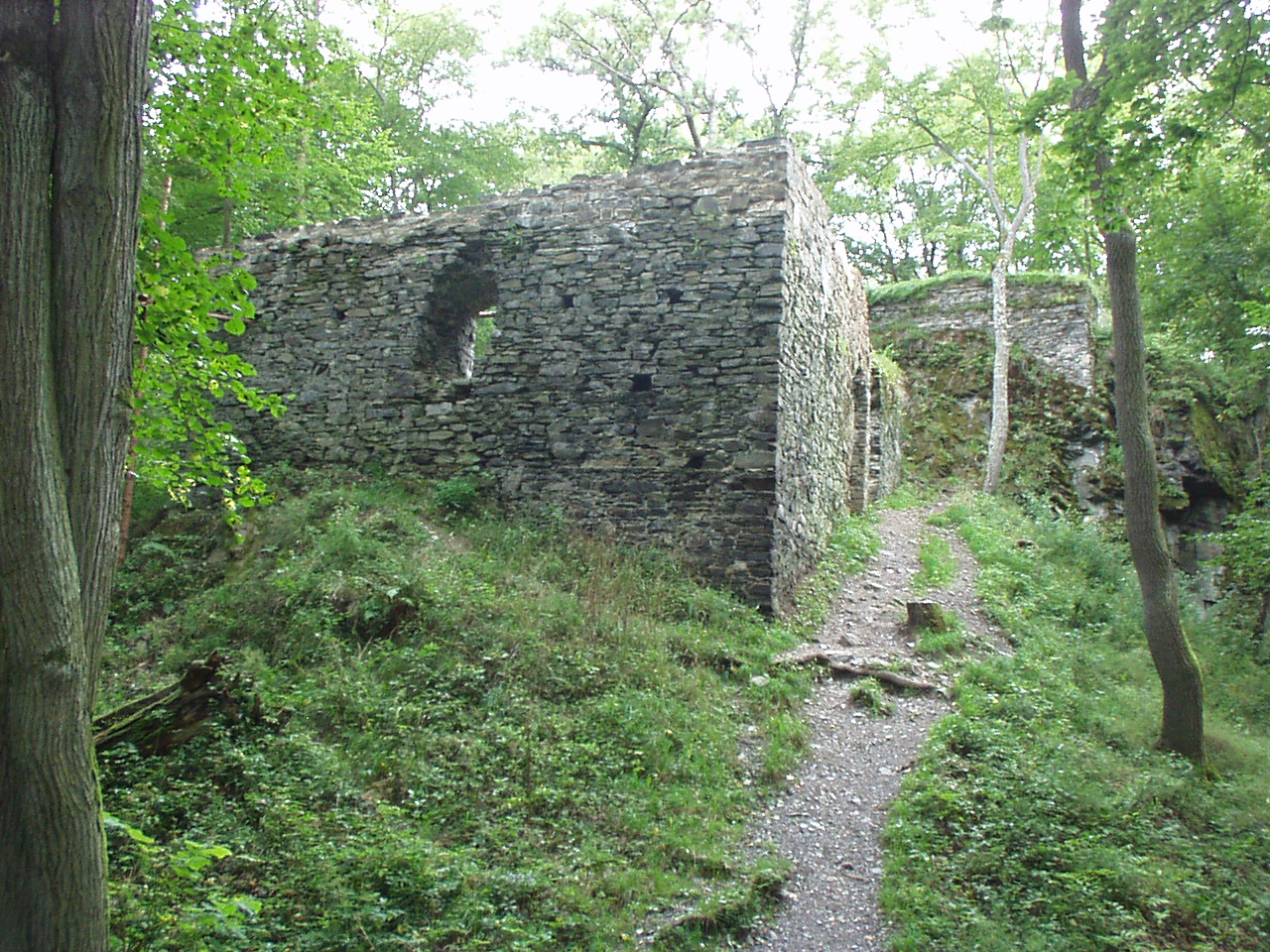 zřícenina hradu Jenčov – palác (vlevo), věž (vpravo) a přístupová pěšina